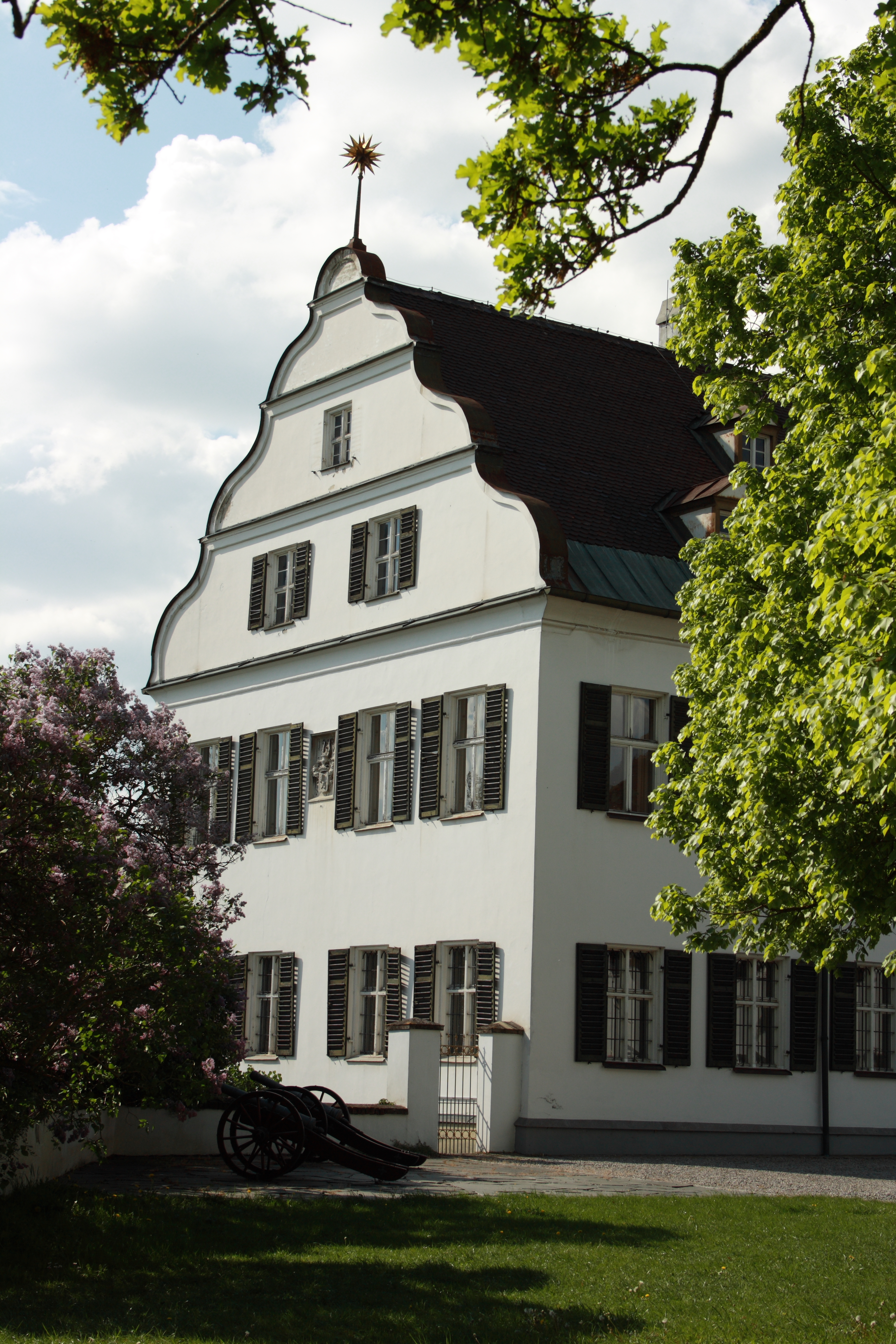 Schloss Scherneck in Rehling, einer Gemeinde im Landkreis Aichach-Friedberg (Bayern)